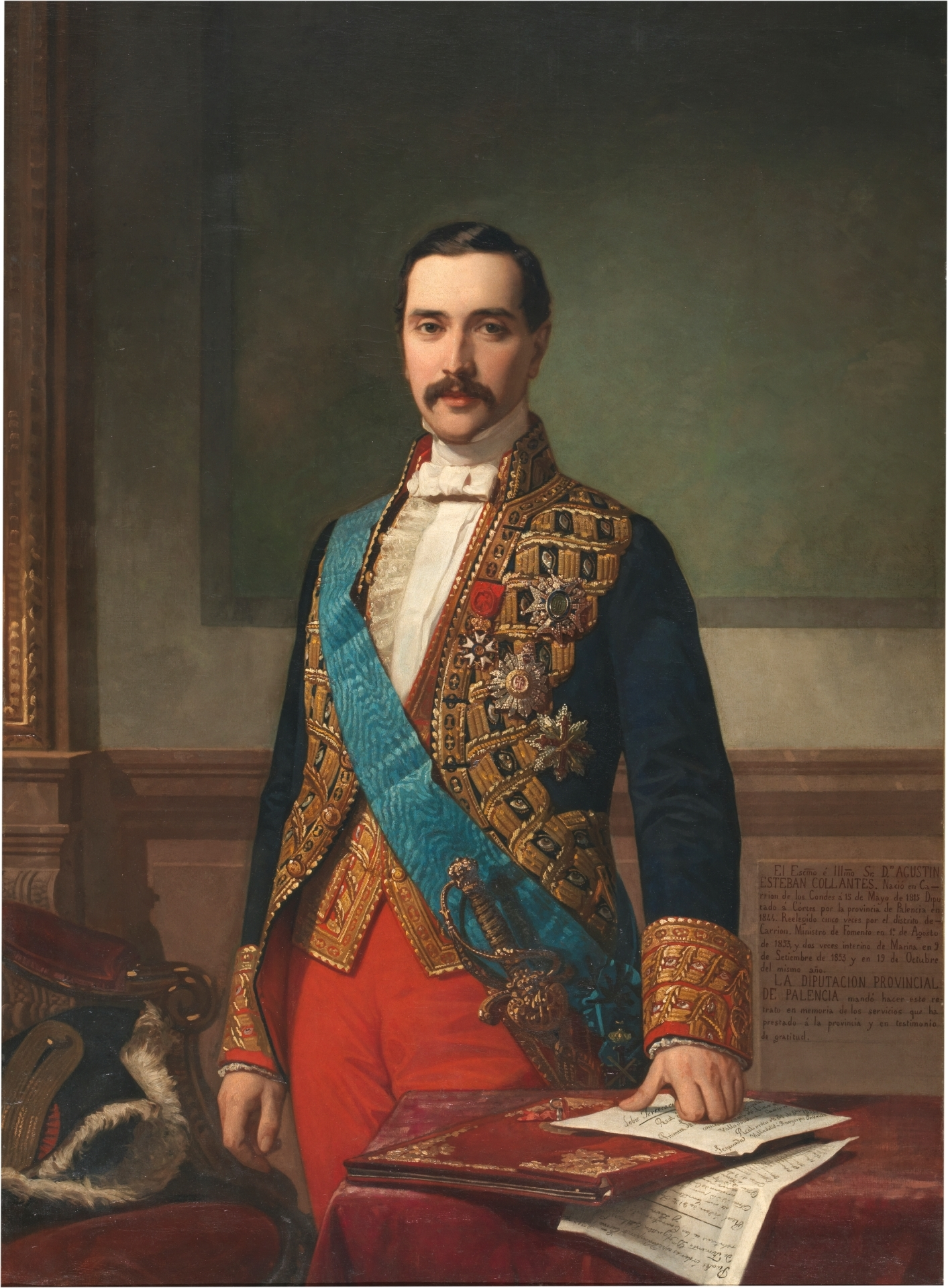 Retrato del político y periodista español Agustín Esteban Collantes (1815-1876).